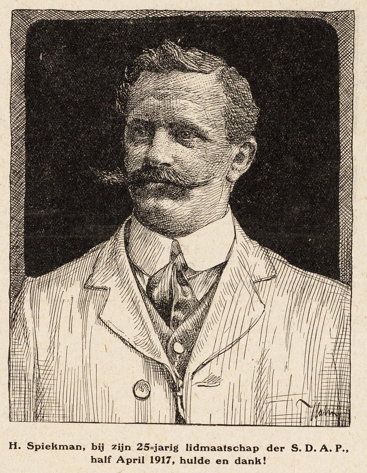 Hendrik Spiekman Tekenaar: Hahn, Albert uitgever: De Notenkraker